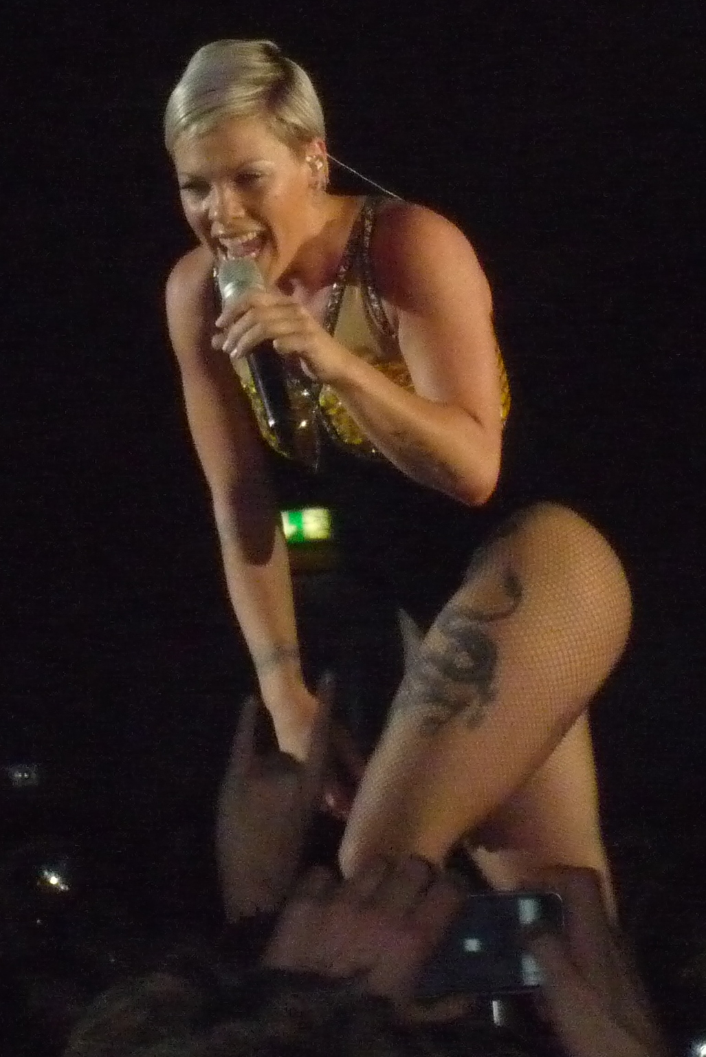 Pink in der Freiburger Rothausarena